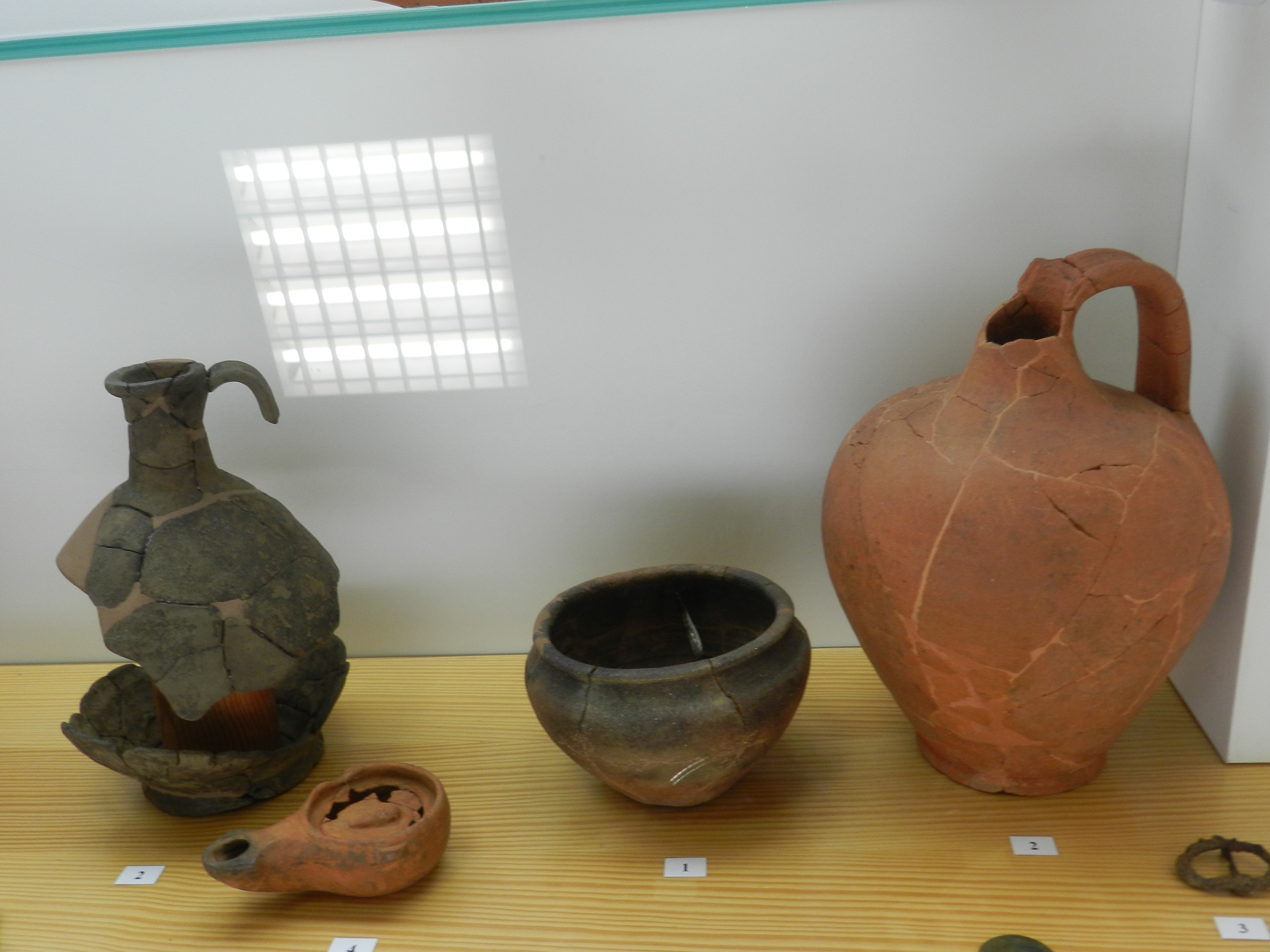 alcuni oggetti nel museo civico di Castelleone